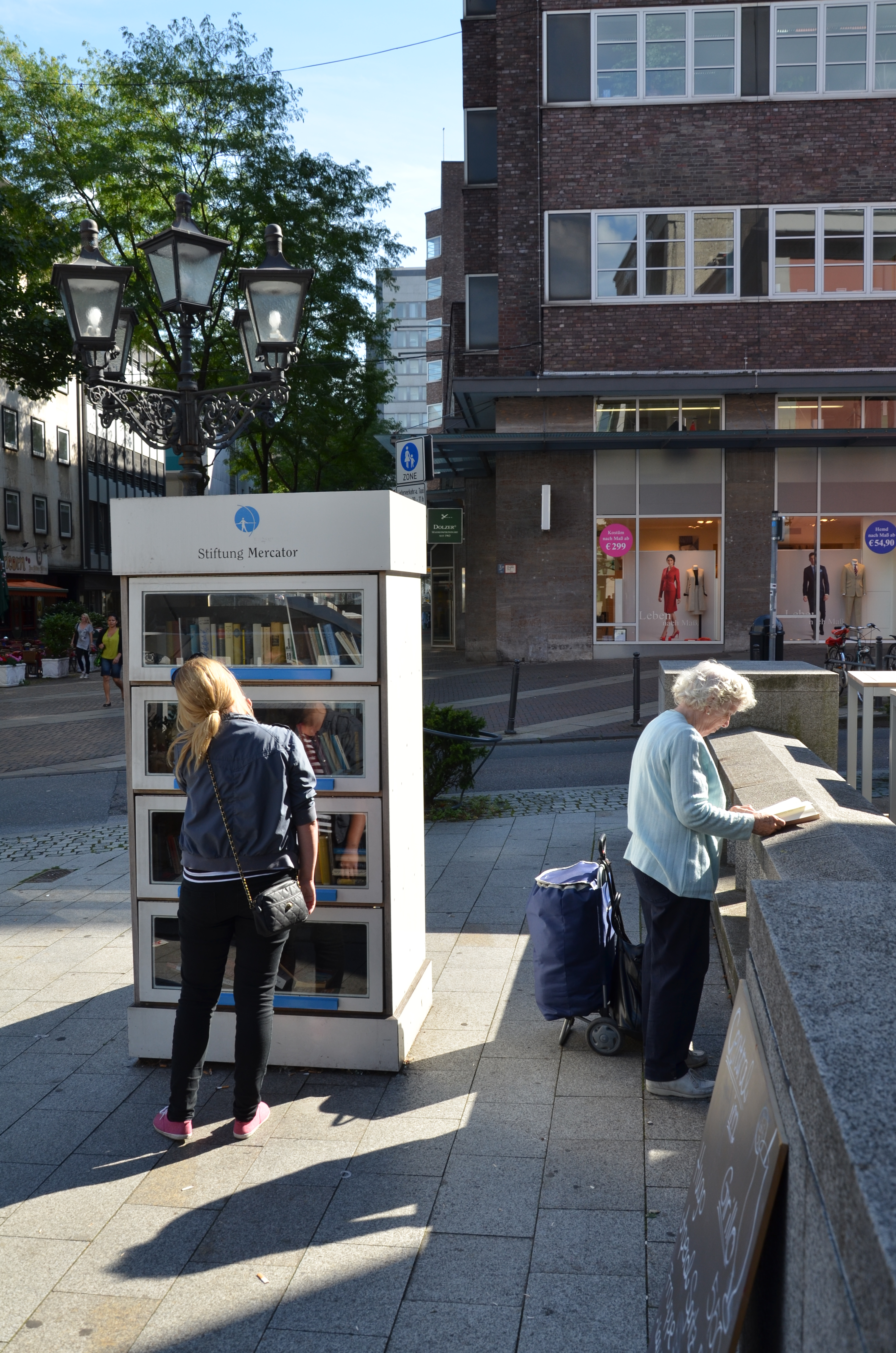 Öffentlicher Bücherschrank in Essen, NRW (am Grillo-Theater) mit interessierten Leserinnen